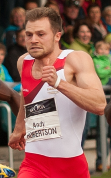 Salzburger Leichtathletik Gala am 27. Mai 2015: Andrew Robertson